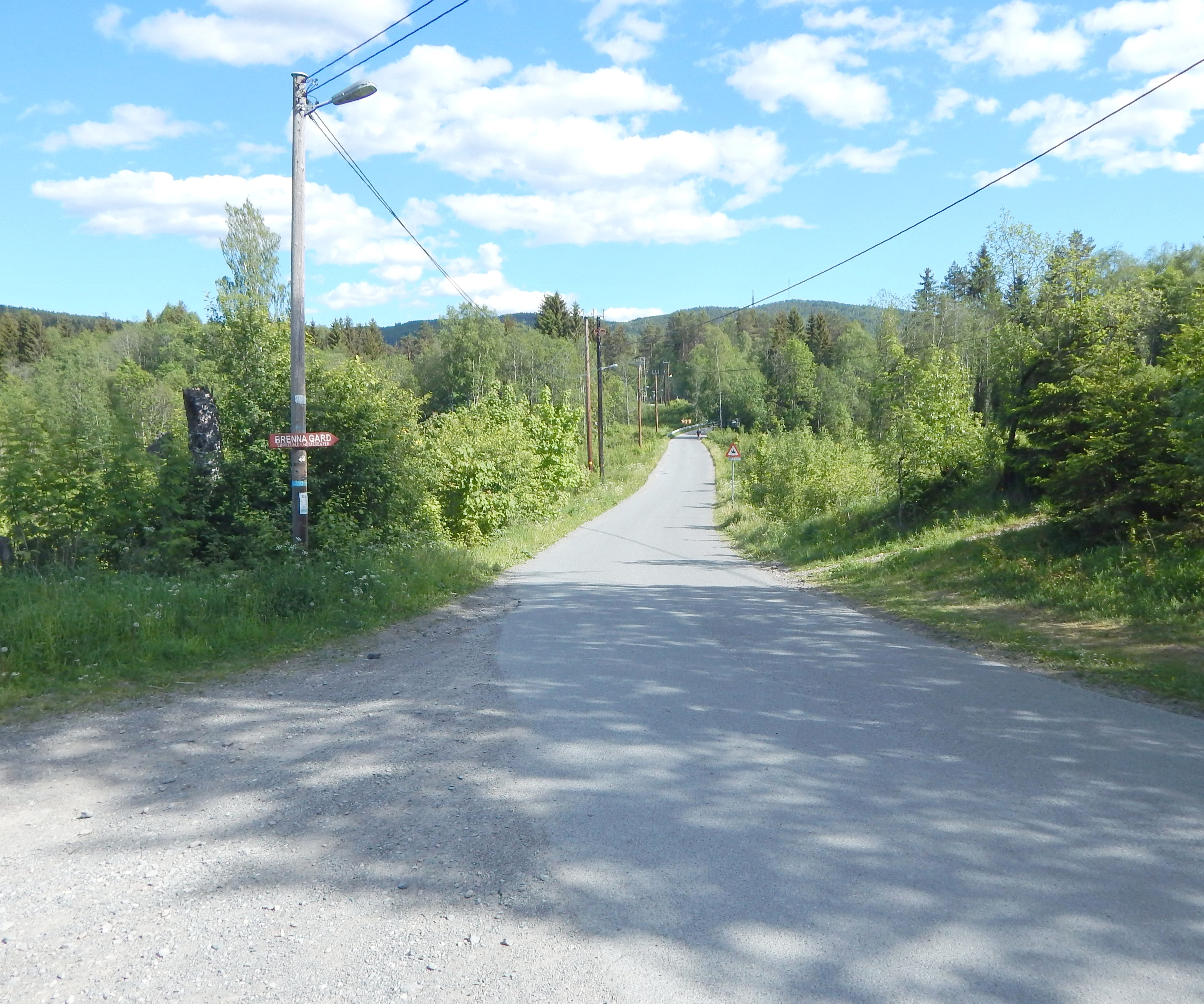 Zinoberveien nord for Brenna